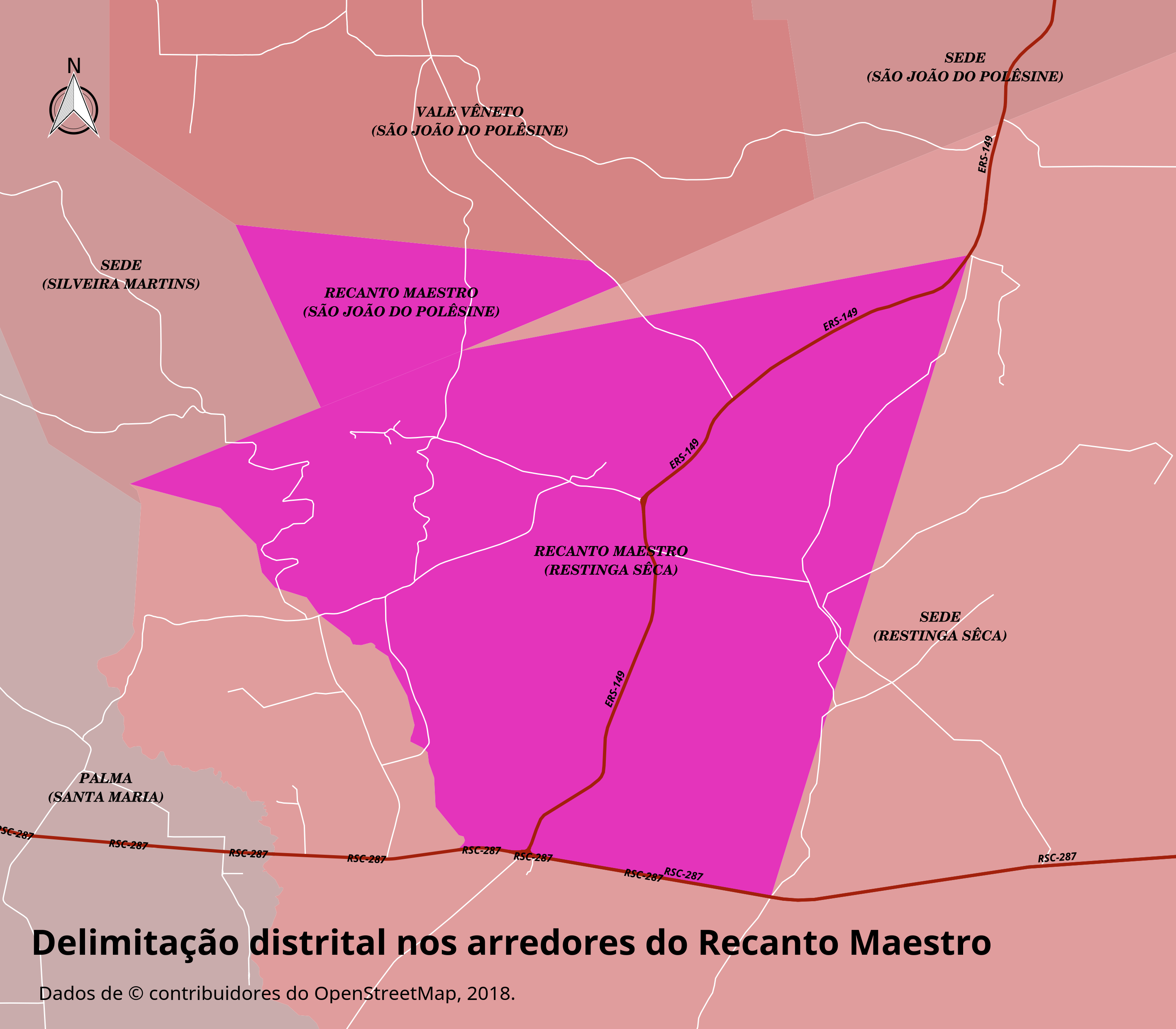 Delimitação distrital nos arredores do Recanto Maestro. Mapa mostrando a delimitação do distrito polesinense do Recanto Maestro e do distrito restinguense do Recanto Maestro, bem como os distritos de sua vizinhança. Formato do nome dos distritos: Distrito (Município) São João do Polêsine | Restinga Seca Rio Grande do Sul - Brasil